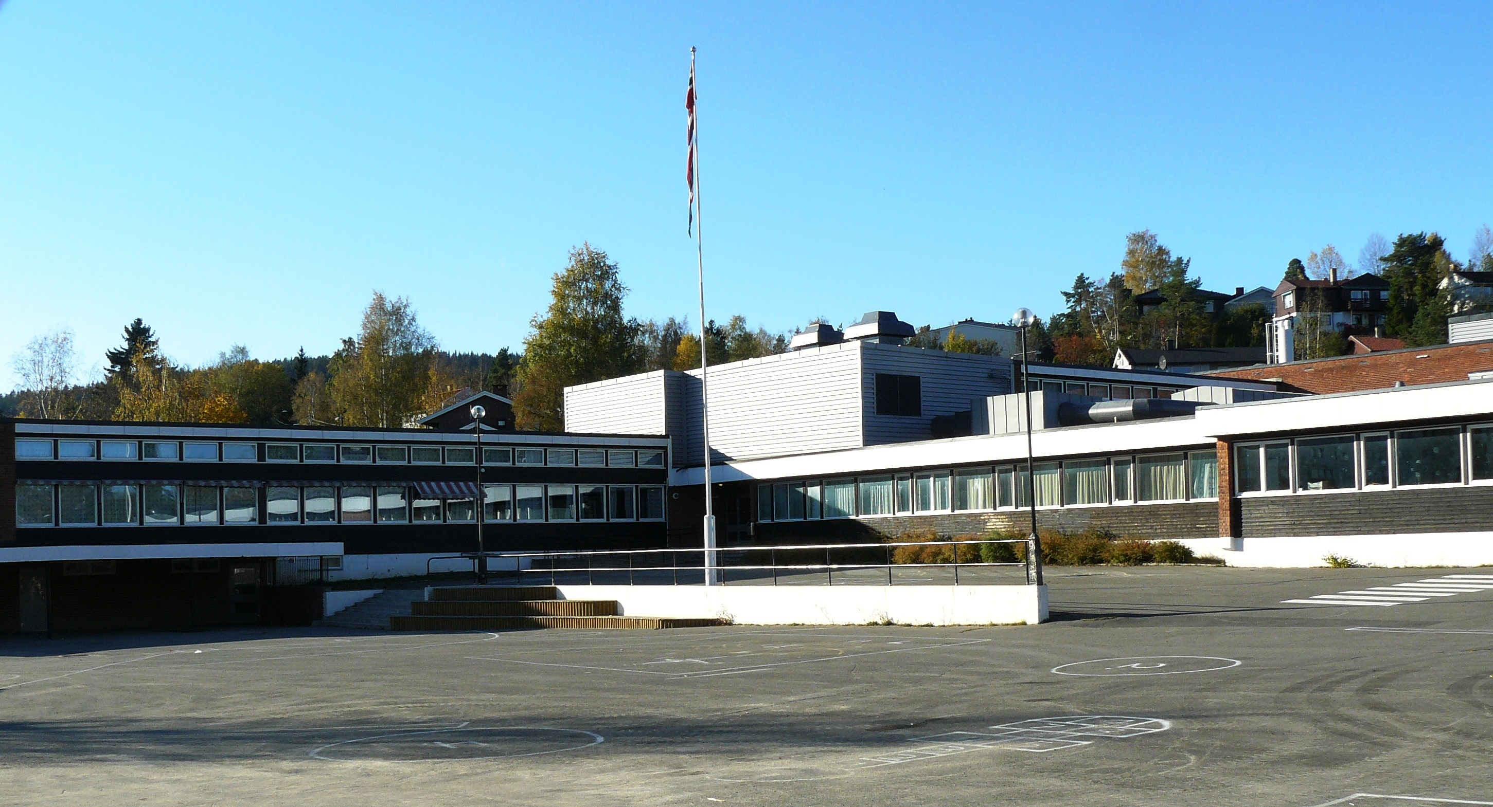 Rødtvet school, Oslo